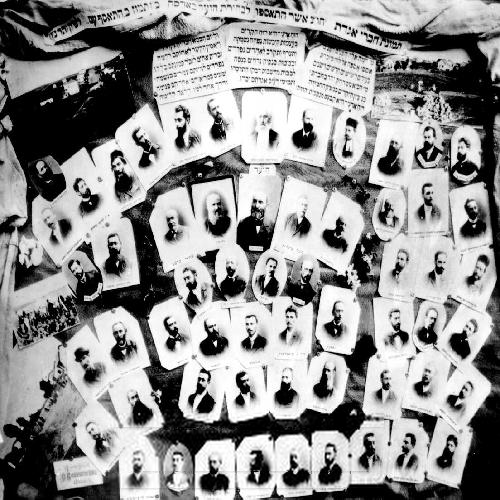 אגדת חובבי ציון, חברי האגודה שהתאספו באודיסה לבחירת הועד האודיסאי ( 1896).